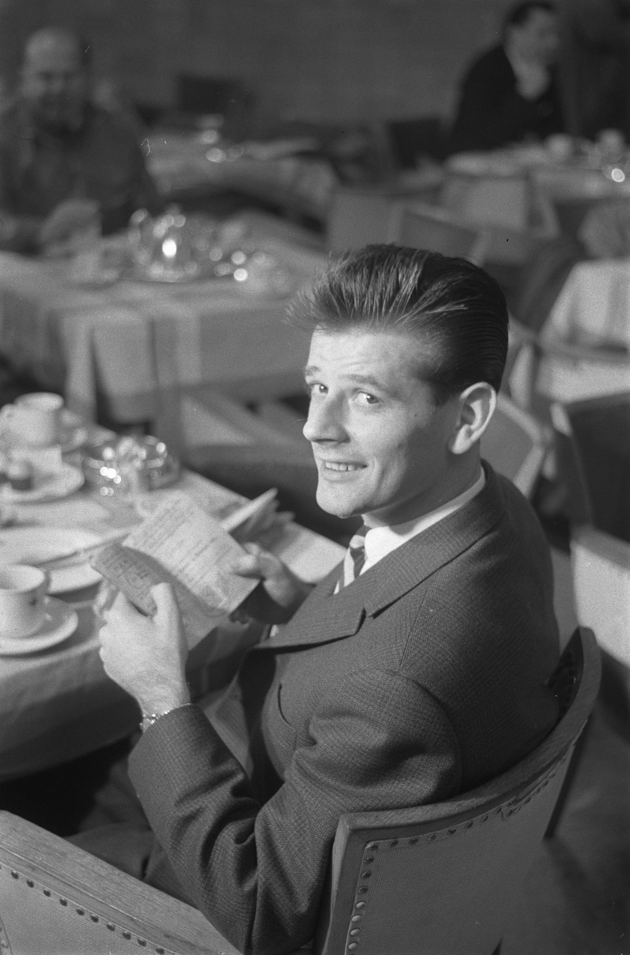 Collectie / Archief : Fotocollectie Anefo Reportage / Serie : [ onbekend ] Beschrijving : Vertrek van het Nederlands elftal naar Praag van Schiphol Notermans, met zijn in alle haast in orde gemaakt paspoor Datum : 28 oktober 1960 Locatie : Noord-Holland, Schiphol Trefwoorden : elftallen, paspoorten, vertrekken Persoonsnaam : Notermans, Jan Fotograaf : Pot, Harry / Anefo Auteursrechthebbende : Nationaal Archief Materiaalsoort : Negatief (zwart/wit) Nummer archiefinventaris : bekijk toegang 2.24.01.05 Bestanddeelnummer : 911-7225